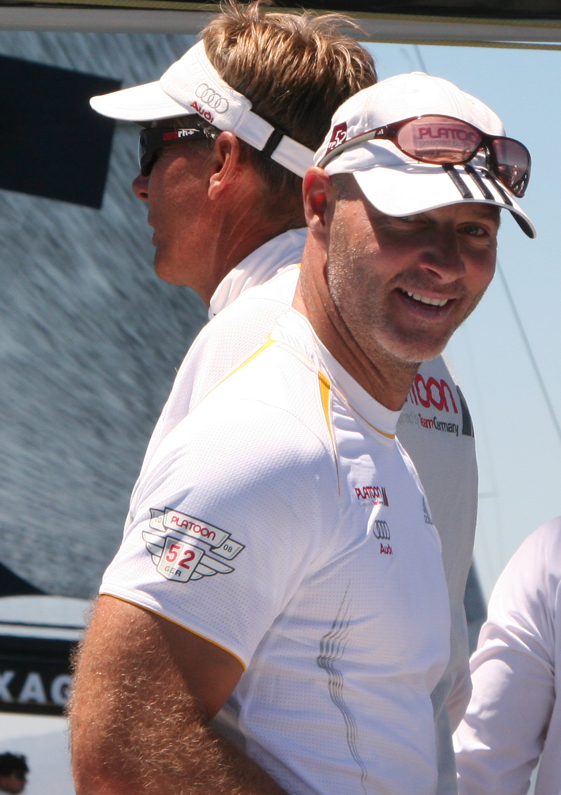 Das Foto ist entstanden beim Audi Medcup nach dem Rennen.